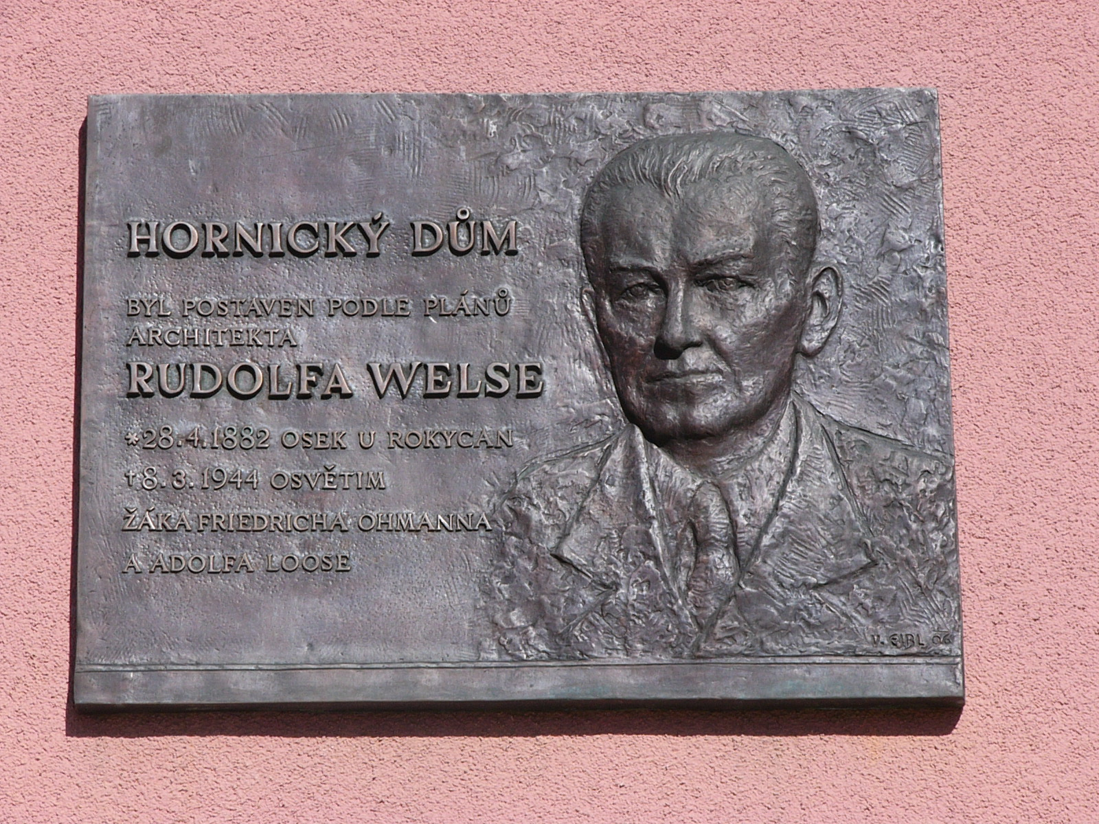 Ansicht von Sokolov